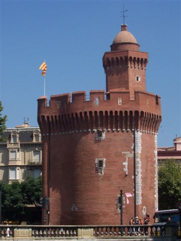 Castellet de Perpinyà